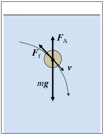 Fluido baten barnean grabitatearen eraginez erortzen ari den solido batek jasaten dituen indarraen eskema.